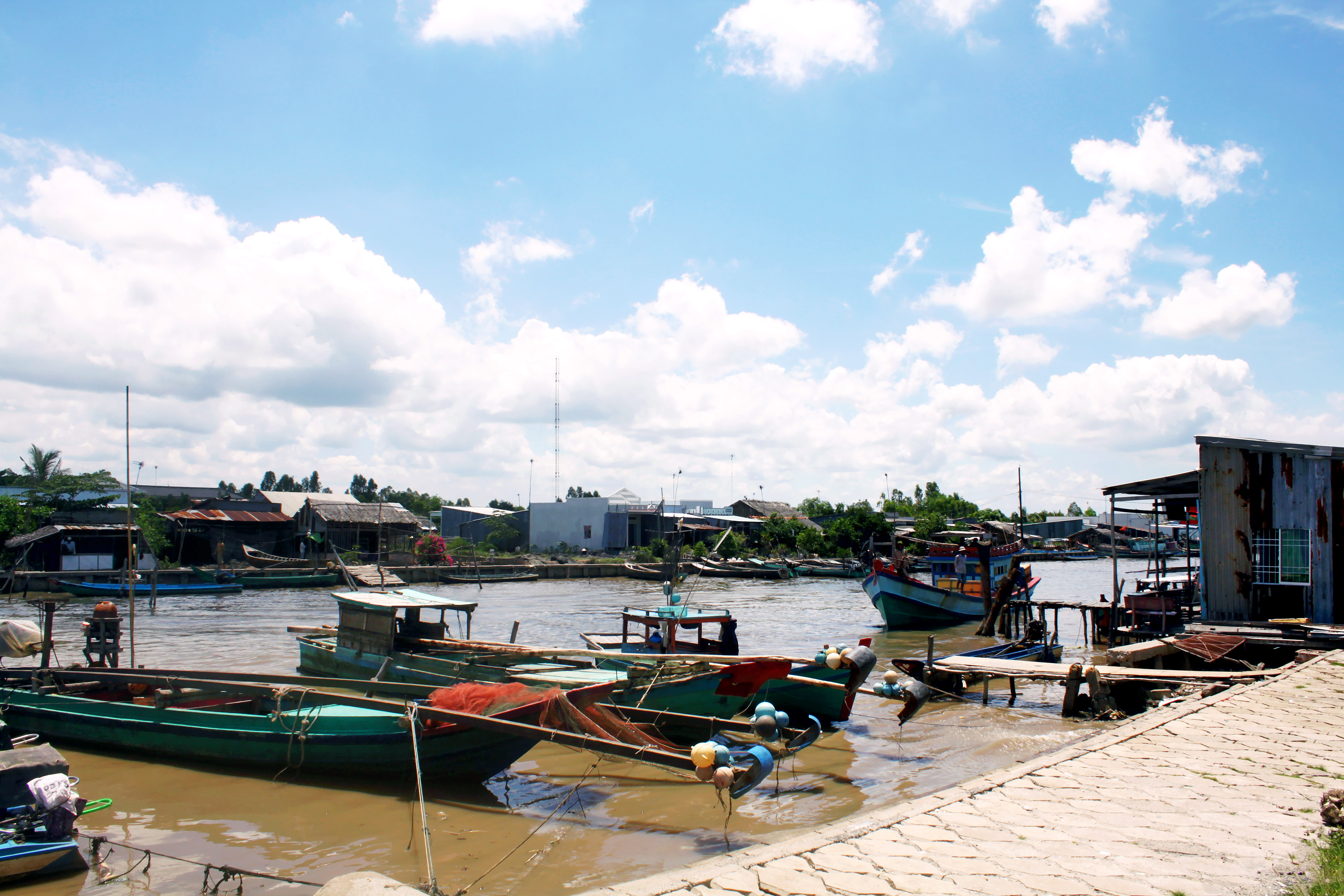 Một góc ấp Đá Bạc B (ở cạnh Khu du lịch Hòn Đá Bạc) thuộc xã Khánh Bình Tây, huyện Trần Văn Thời, tỉnh Cà Mau, Việt Nam